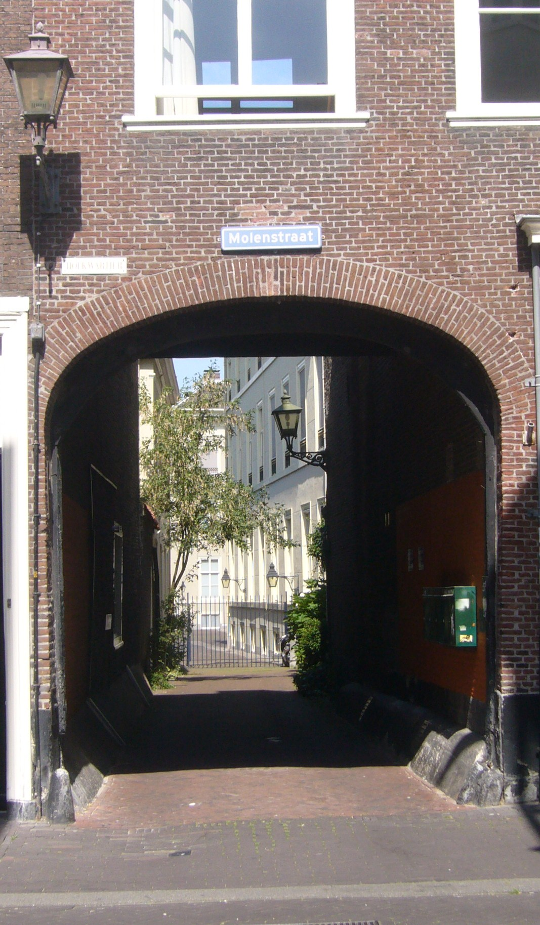 Koningspoort Molenstraat Den Haag, met doorkijkje naar de tuin van Paleis Noordeinde